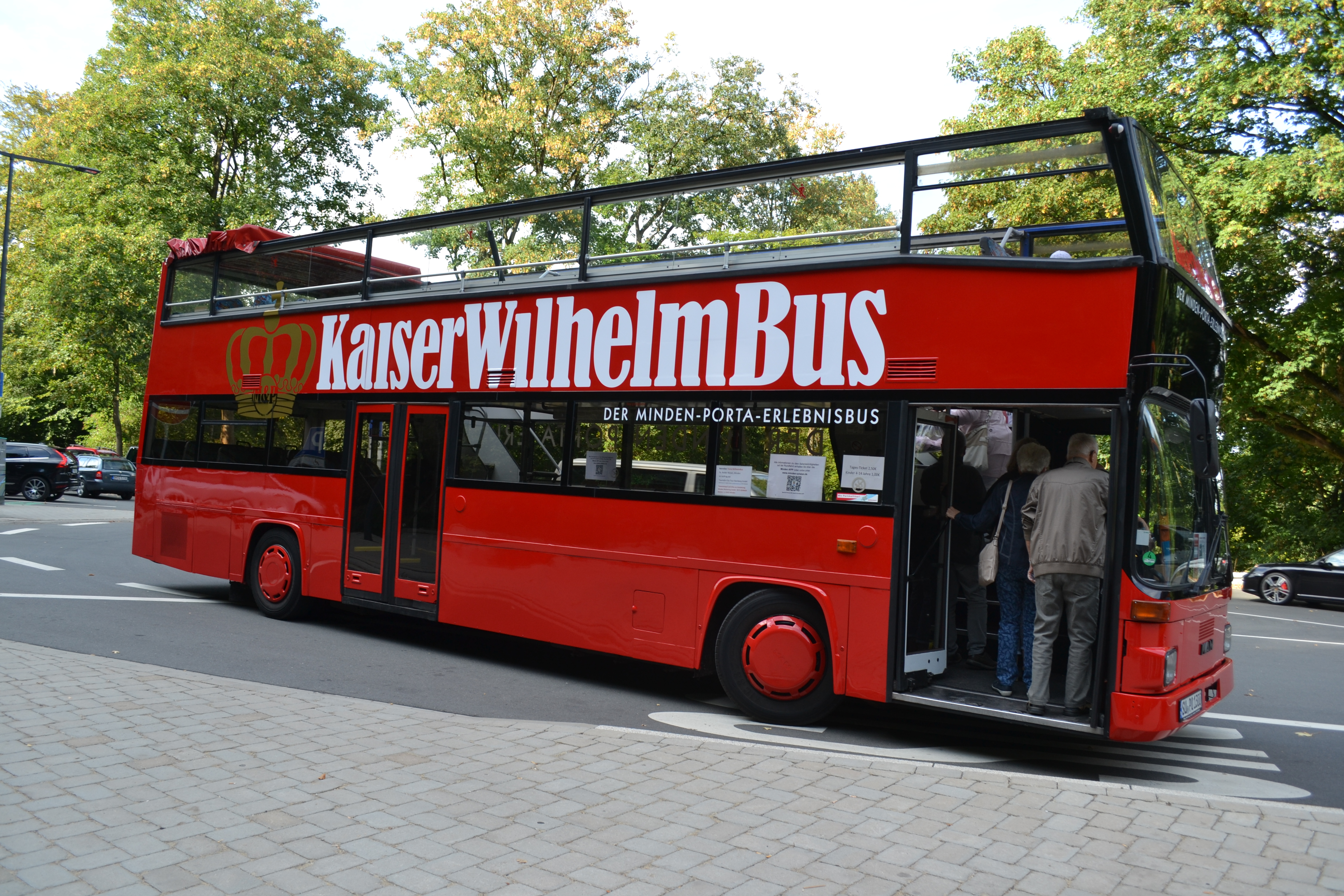 jajajjaj